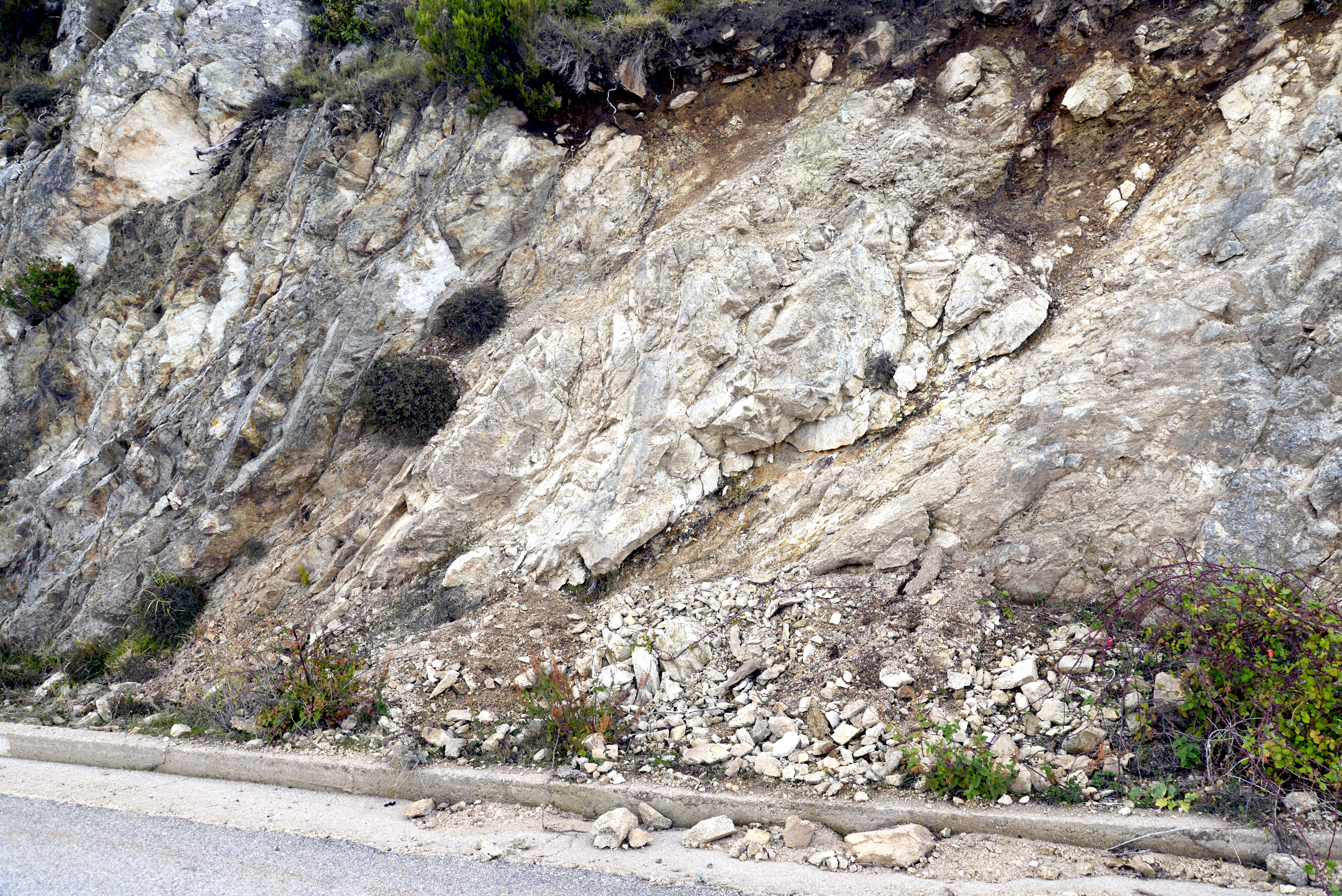 Tavera, Gravona (Corse) - Découpe de la roche granitique en bordure de la route D27 sous le col de Scalella (versant nord).